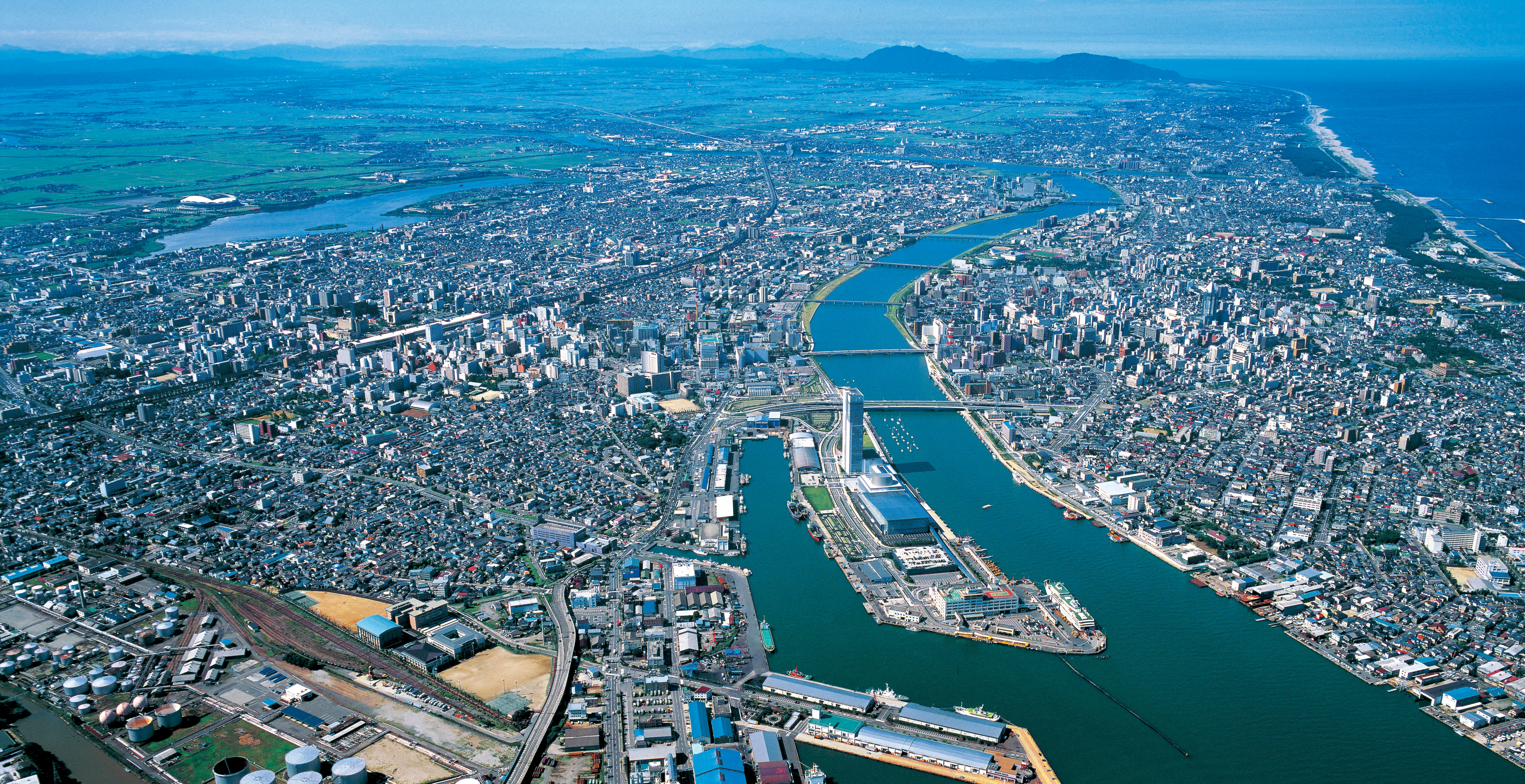 新潟のまち 新潟市 2007年撮影